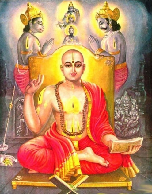 বৈষ্ণব আচার্য। দ্বৈত বেদান্ত দর্শনের জন্য বিখ্যাত।